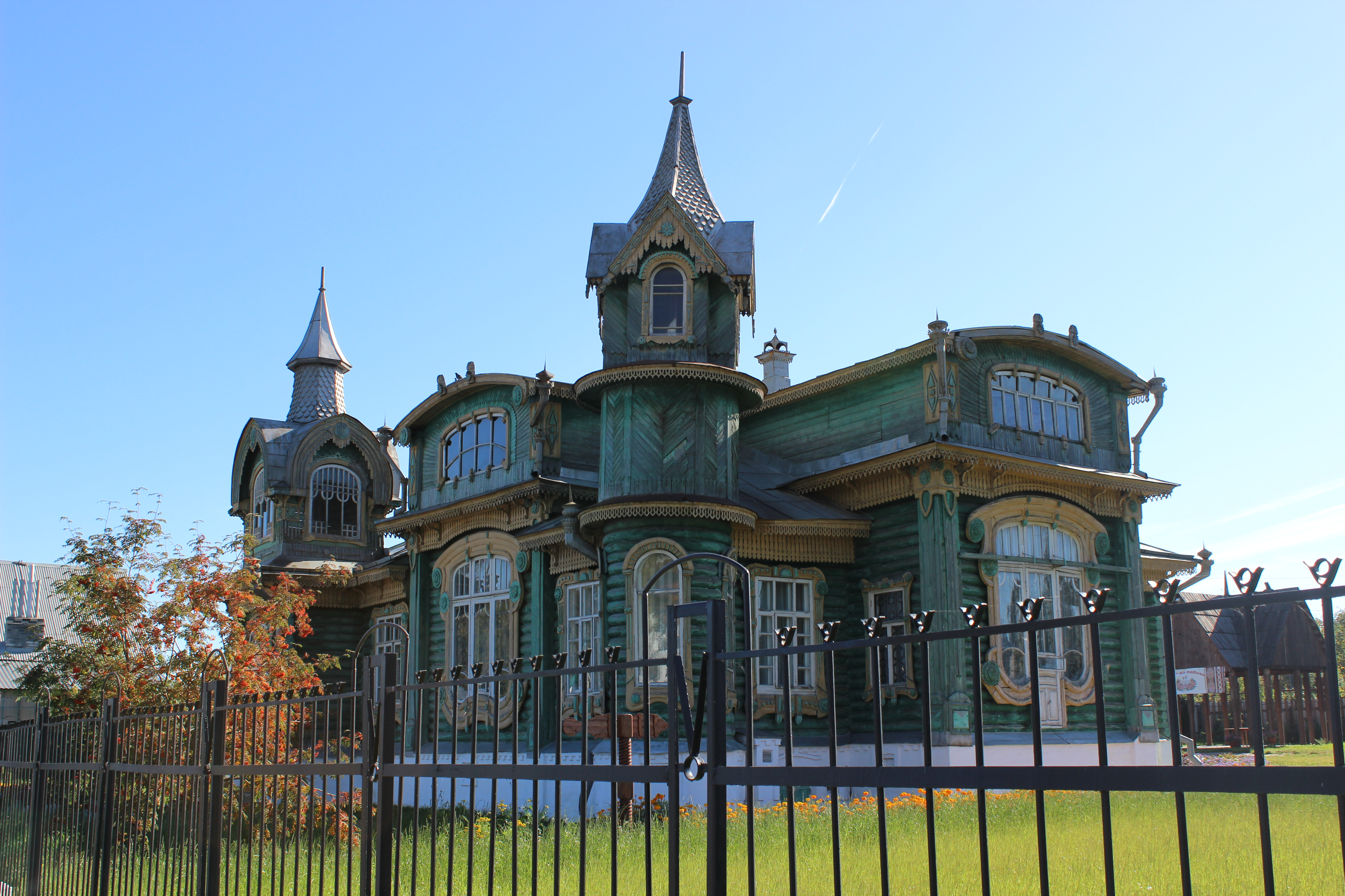 особняк Шорина: улица Московская, 45, Гороховец, Гороховецкий район, Владимирская область